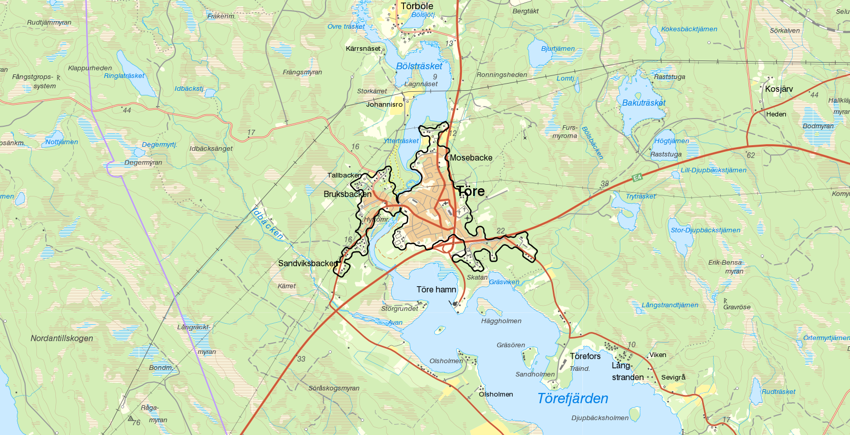 Tätorten Töre med gränserna från Statistiska centralbyråns tätortsavgränsning 2015 i svart. Bakgrundskarta från Lantmäteriet, skala 1:30 236.